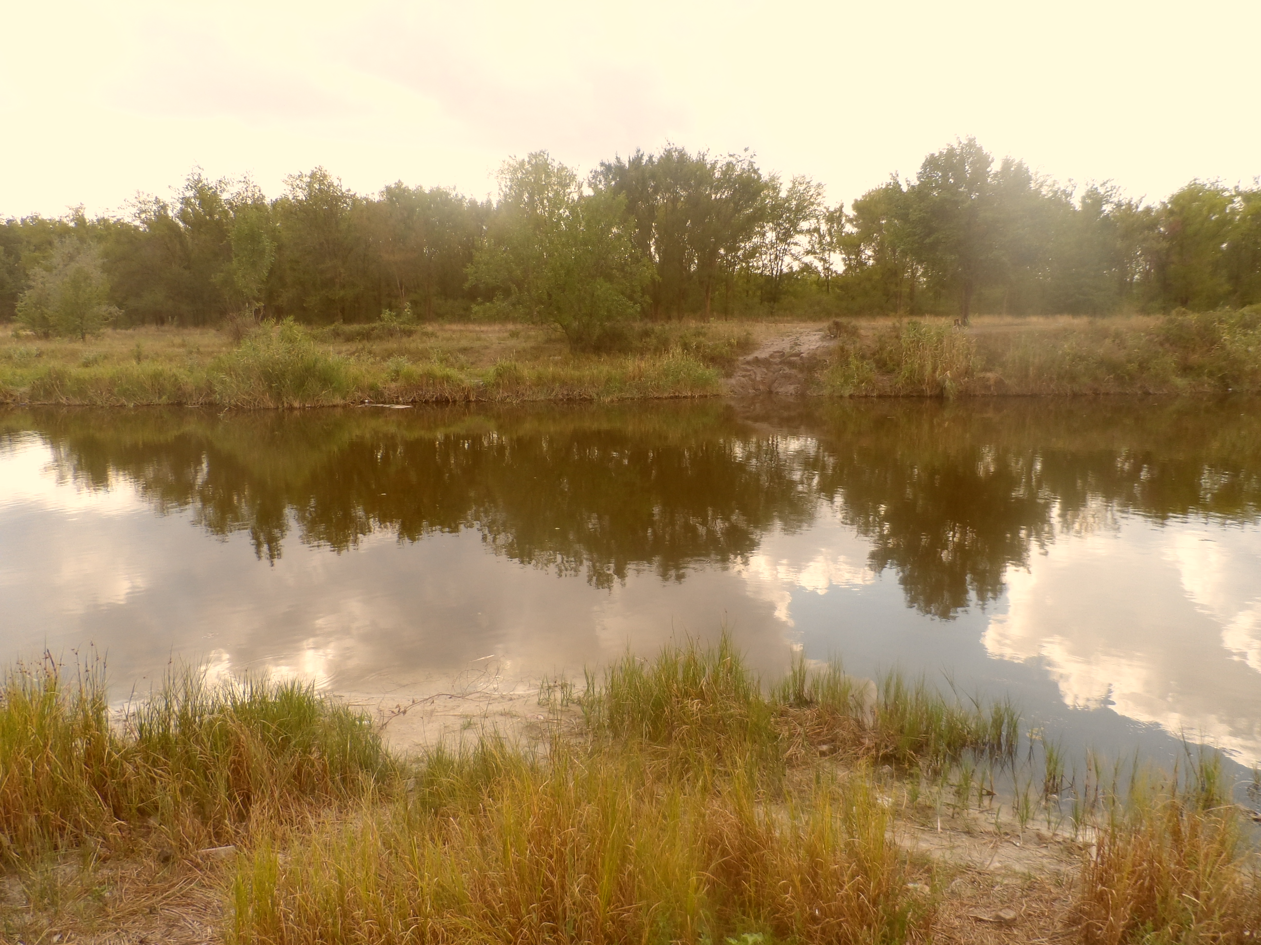 Место отдыха в посёлке Сосновка Мелитопольского района Запорожской области, Украина